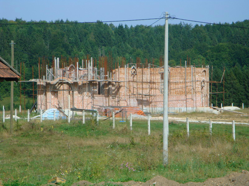 Изградња цркве у Ситници